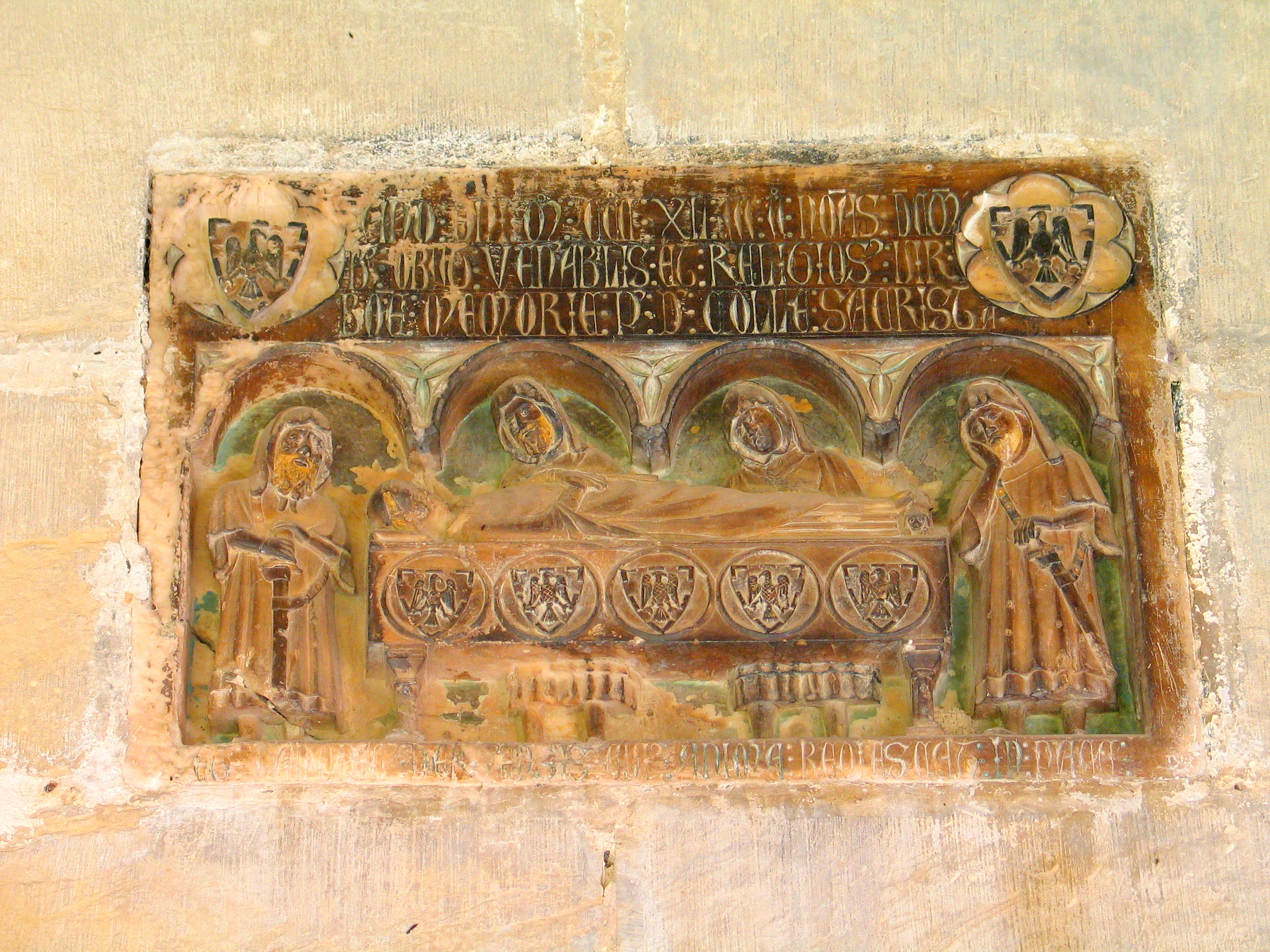 Relleu a la catedral de Tortosa